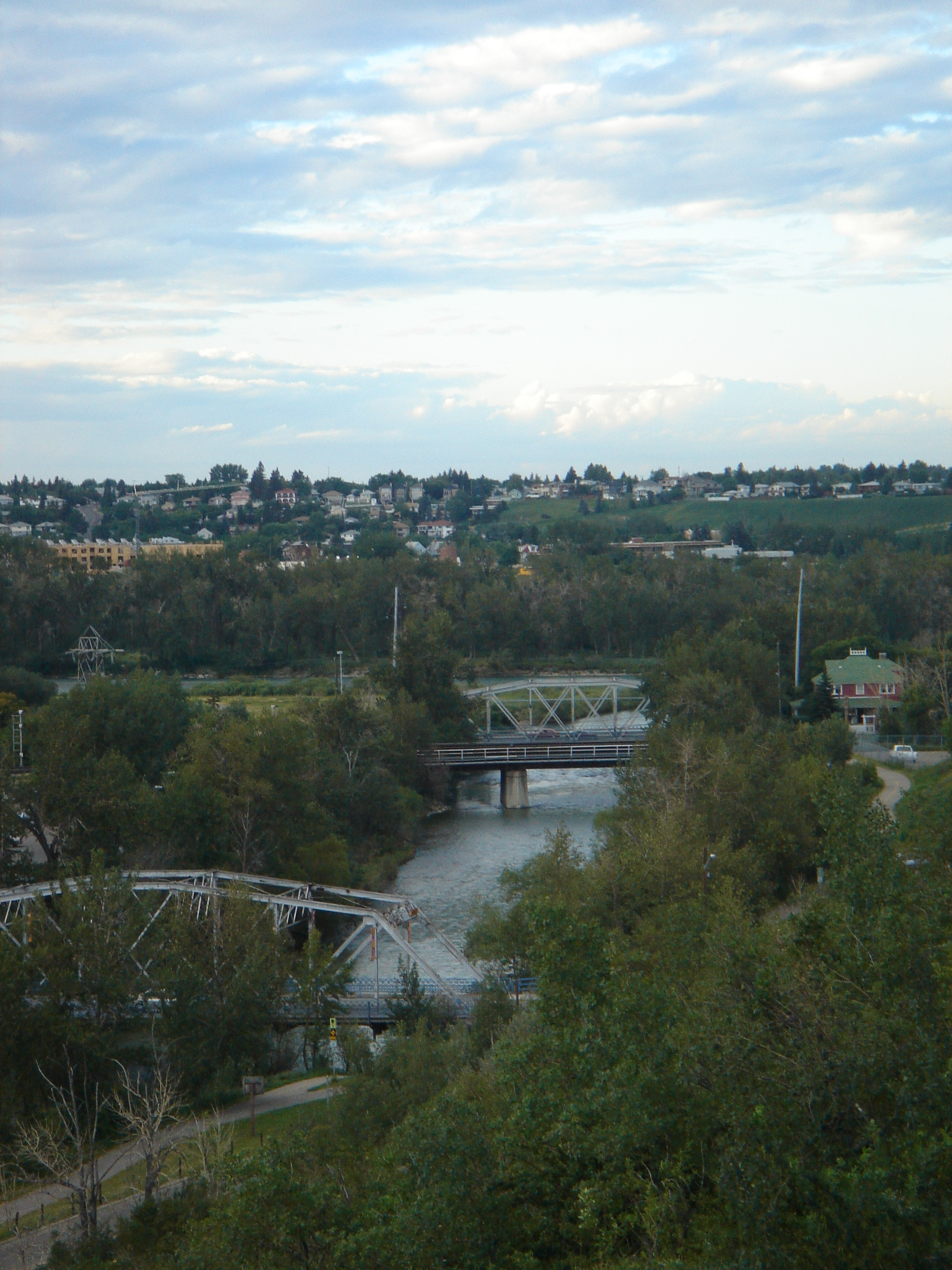 El río Elbow Elbow River, Calgary, July 23, 2005